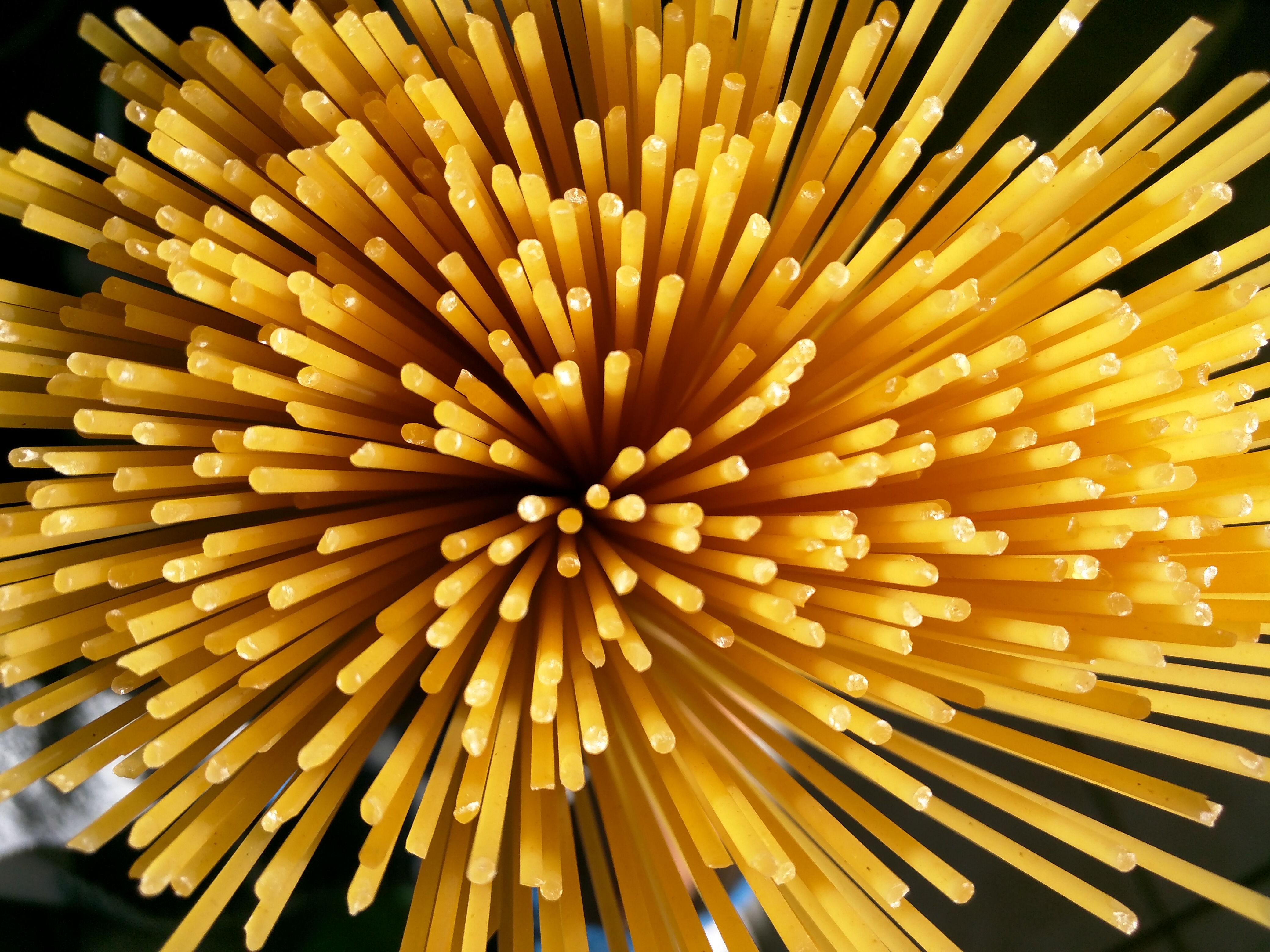 spaghetti